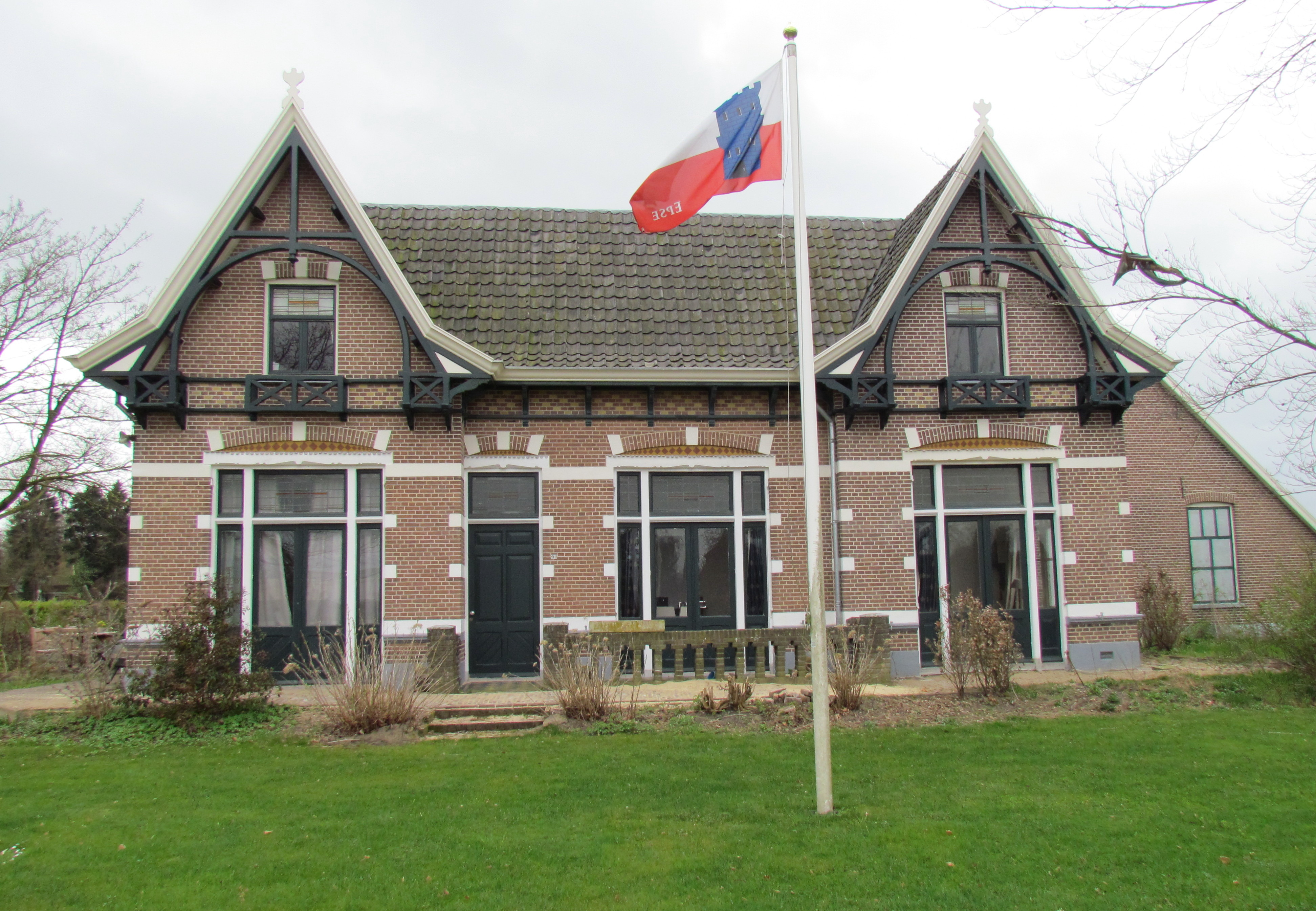 Monumentale boerderij in chaletstijl (gebouwd tussen 1900 en 1925) in Epse (NL)